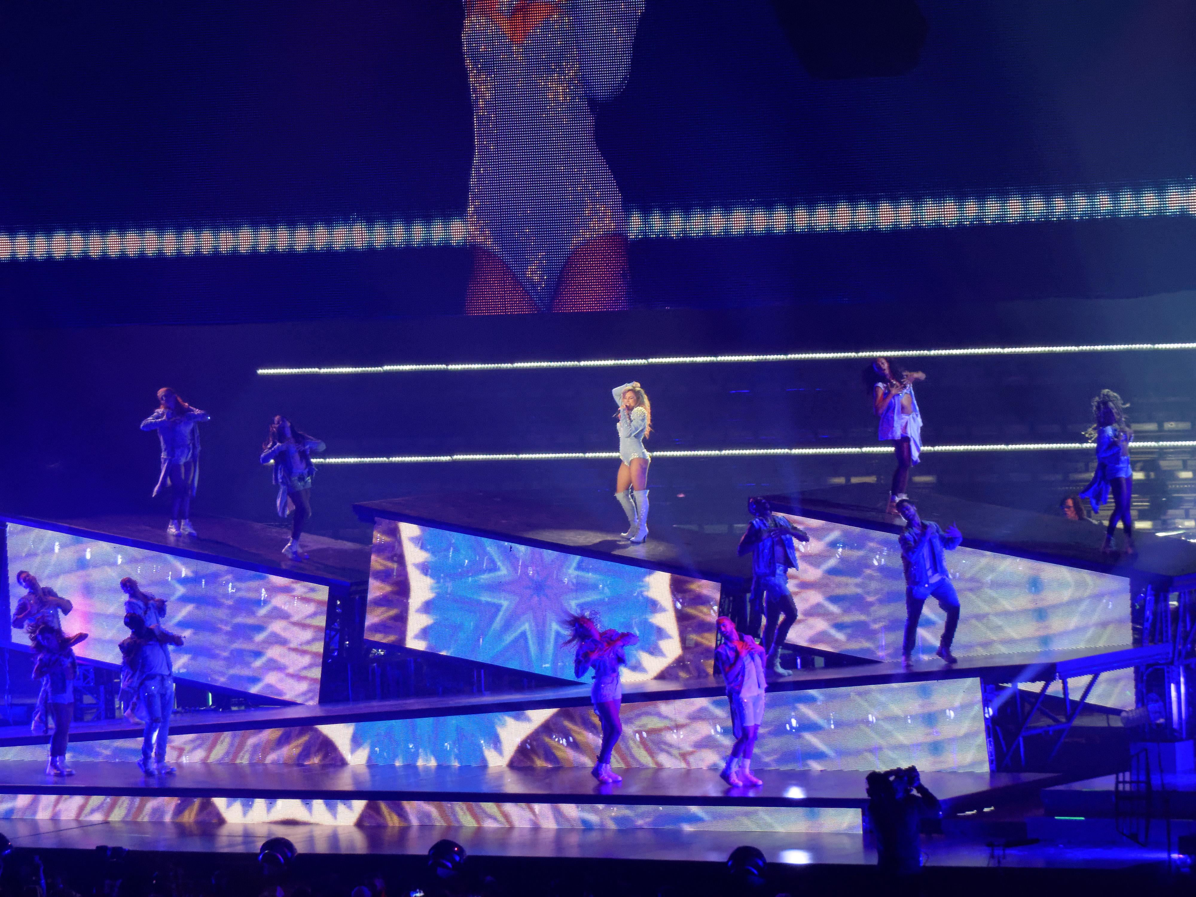 Lady Gaga performing "Telephone" at the Joanne World Tour in Tacoma